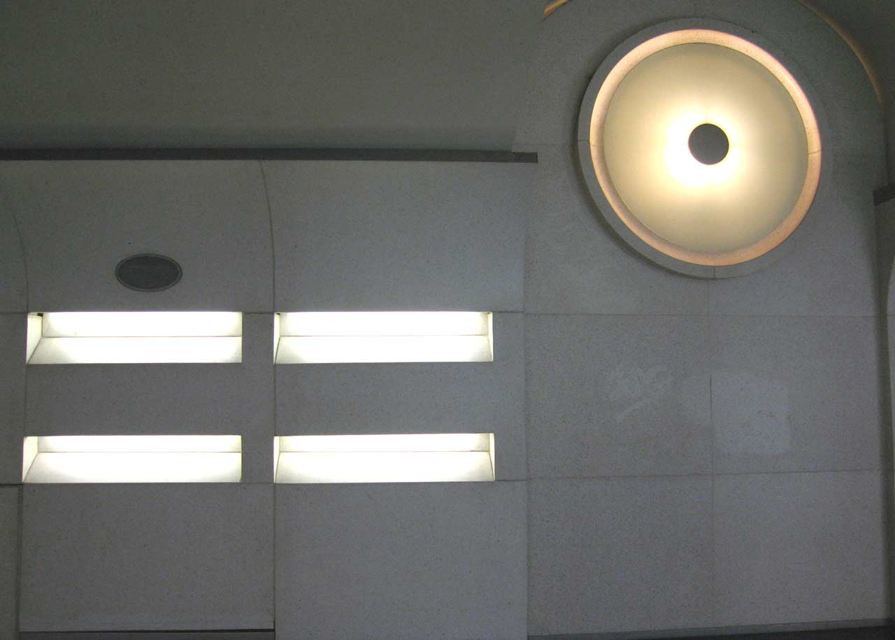 Metro de Paris Ligne 14 Eclairage Lieu : Paris, France Date : Juin 2006 Auteur : Pline photo personnelle